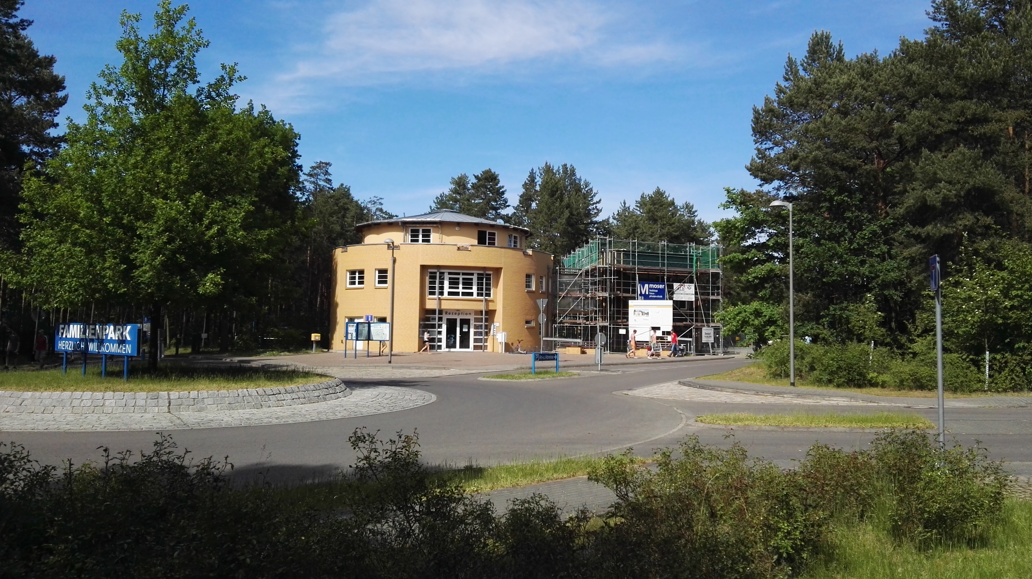 Empfangsgebäude Ferienpark Großkoschen